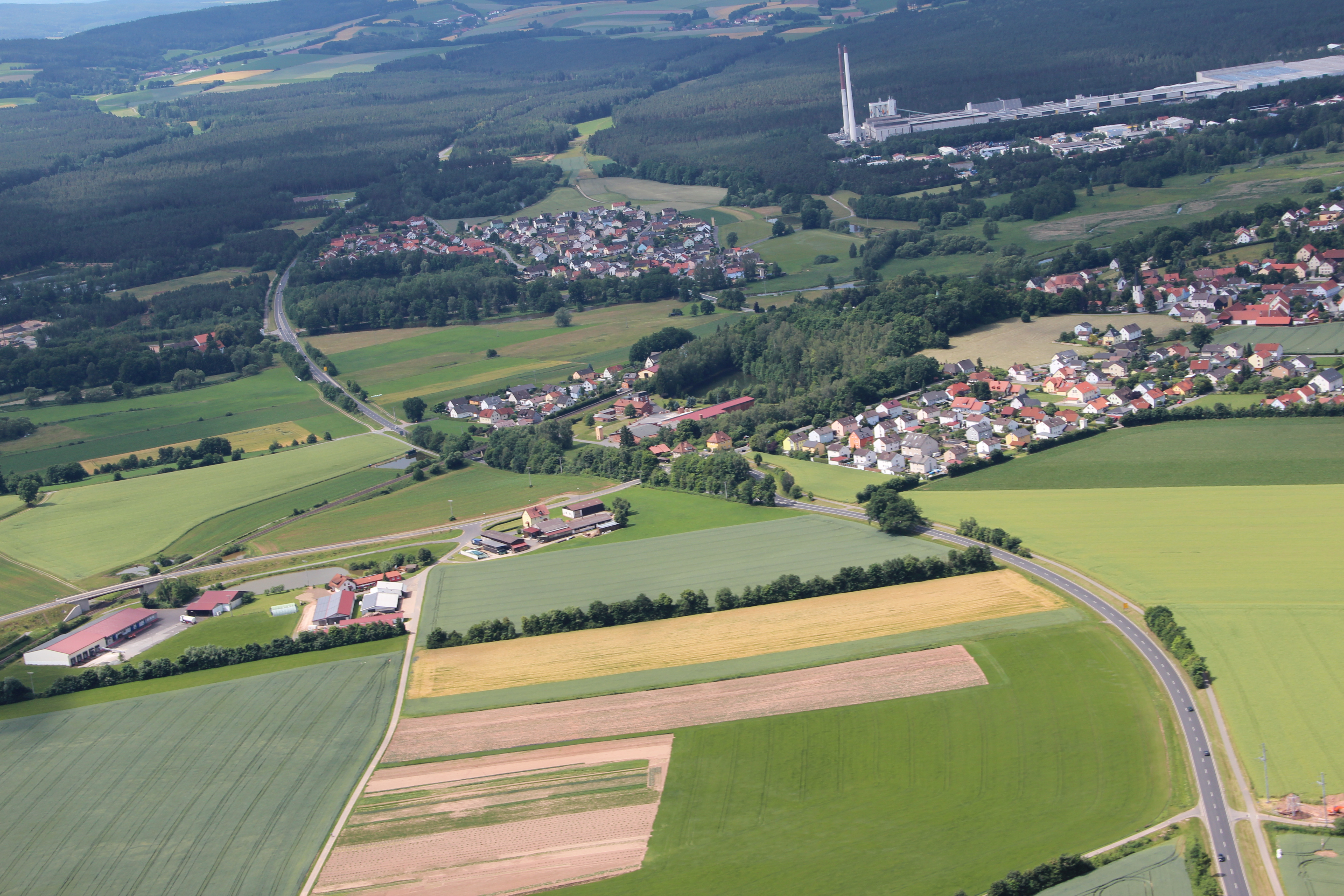 Etzenricht (Bildmitte) mit Ortsteil Radschin , am Bildrand oben rechts das Pilkingtonwerk Deutschland, Weiherhammer, Landkreis Neustadt an der Waldnaab, Oberpfalz, Bayern (2012)